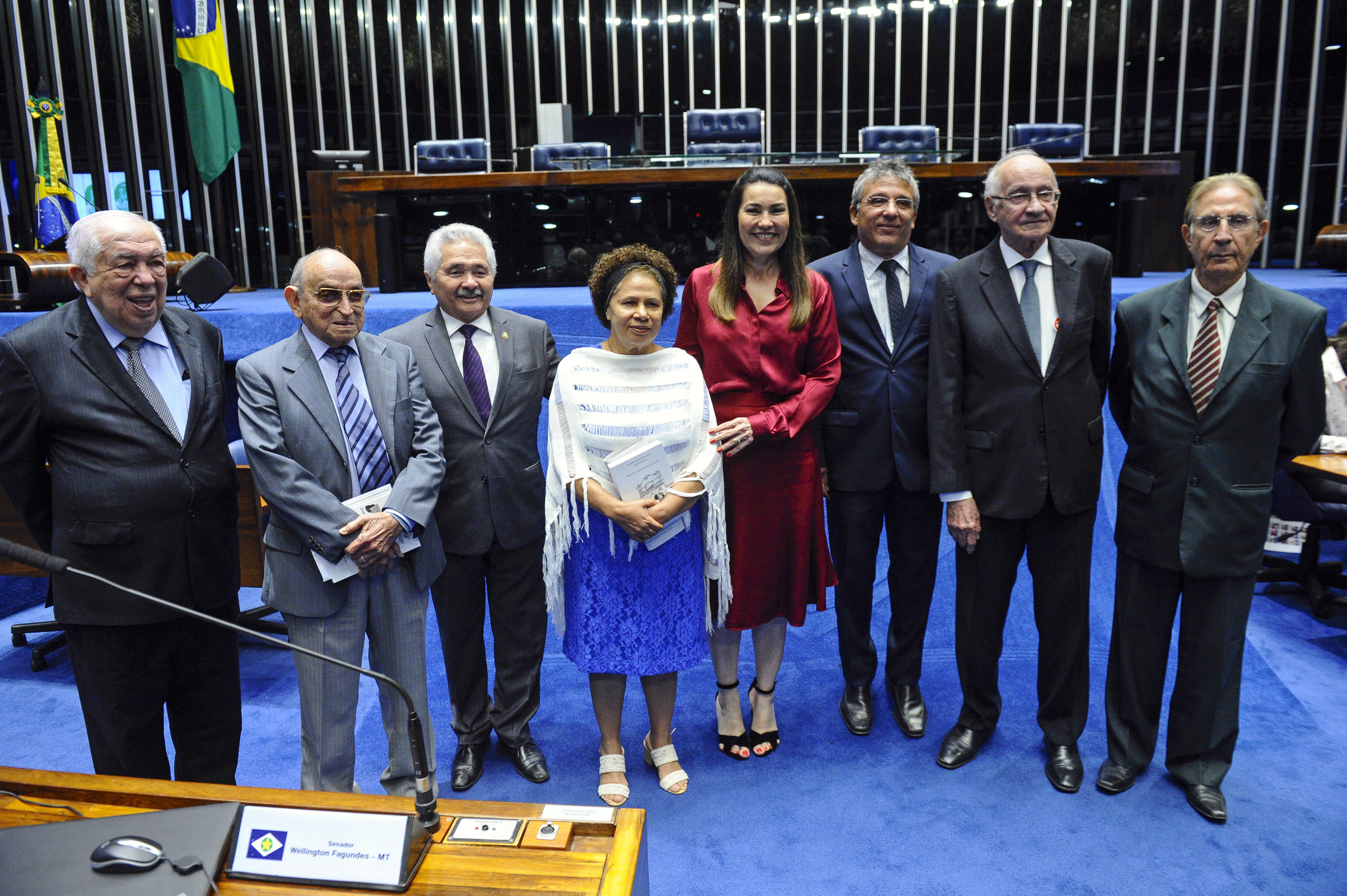 Plenário do Senado Federal durante sessão solene do Congresso Nacional destinada à comemoração do centenário da Academia Piauiense de Letras (APL). Participam: deputado Paes Landim (PTB-PI); vice-governadora do Piauí, Margarete Coelho; presidente e requerente da sessão, senador Elmano Férrer (Pode-PI); senadora Regina Sousa (PT-PI); presidente da Academia Piauiense de Letras (APL), Nelson Nery Costa. Foto: Marcos Oliveira/Agência Senado